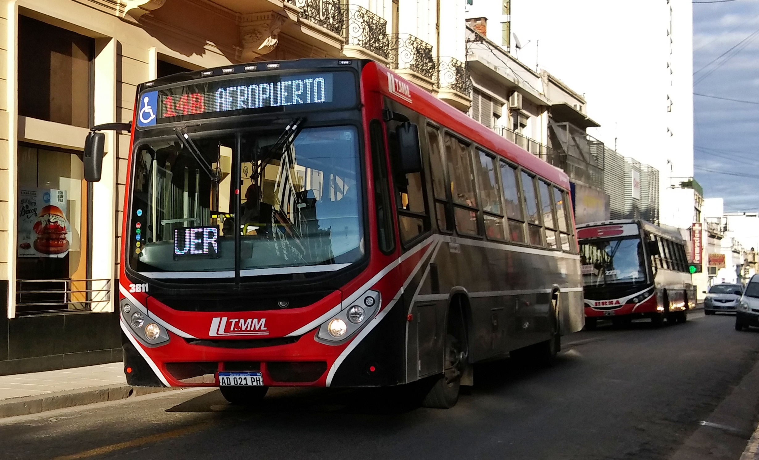 Transporte Mariano Moreno (Grupo ERSA) Línea 14 - Interno 3811 Ramal B: Casa de Gobierno - Aeropuerto (por Av. Almafuerte) Metalpar Tronador 3ra Generación Volkswagen 17.230-OD